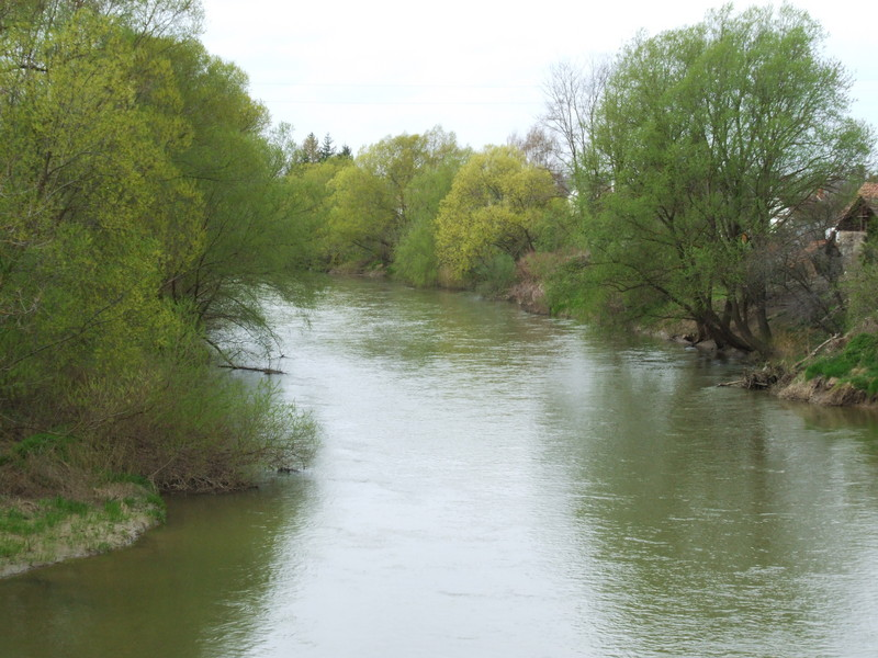 Raba River in Hungary